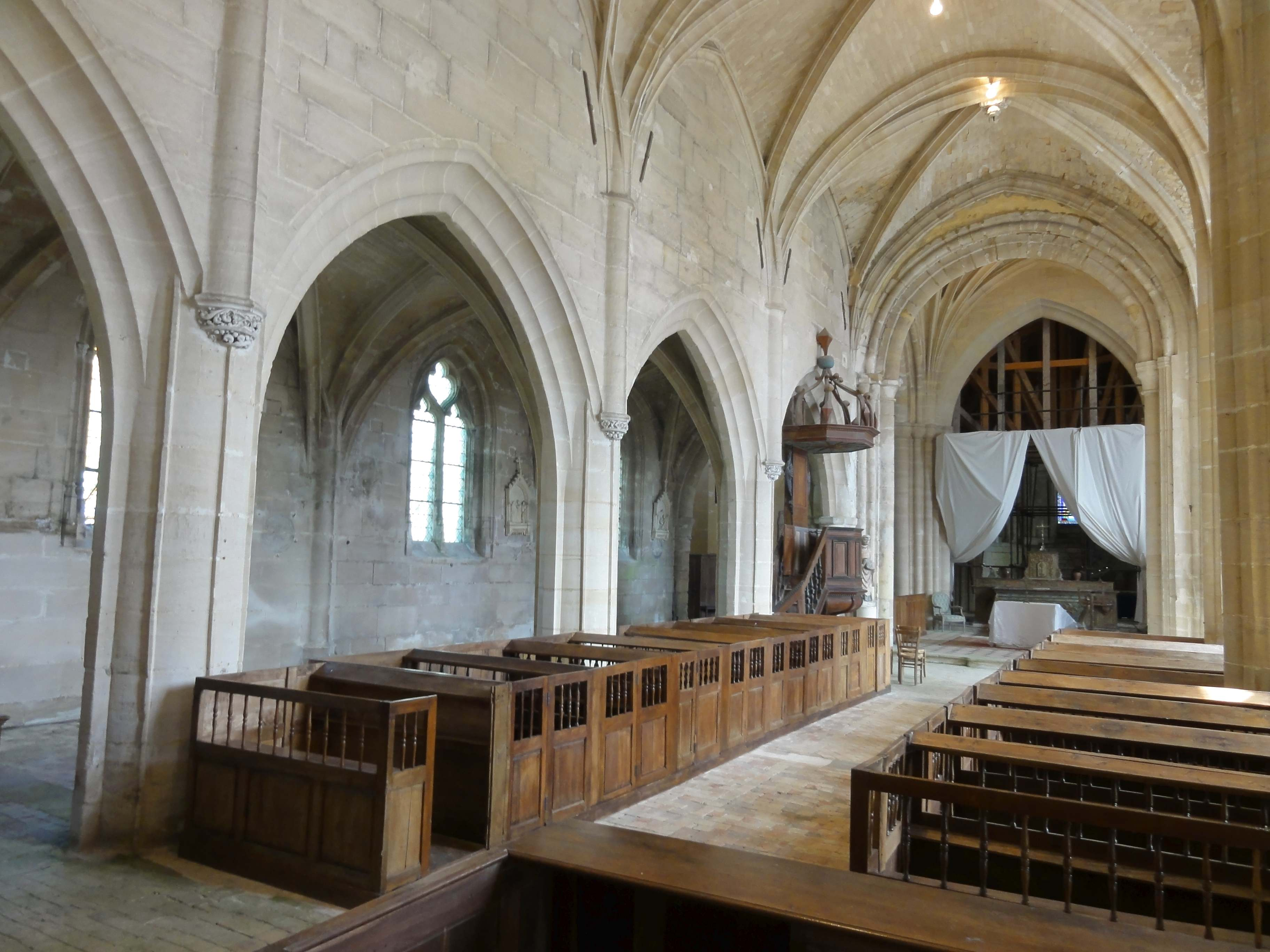 Nef - voir le titre du fichier.